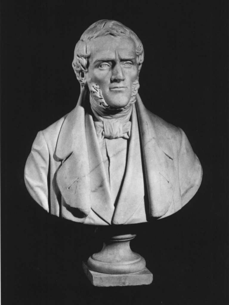 Busto di Luigi Carrer, opera di Giuseppe Soranzo del 1877. Il busto fa parte del Panteon Veneto, conservato presso Palazzo Loredan di Campo Santo Stefano a Venezia.